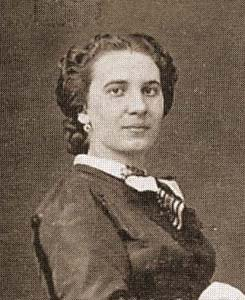 Summary Elisa Hendle, segunda mulher do rei D. Fernando II Licensing 01:18, 26 Fevereiro 2006 L Gonçalves 245x300 (32592 bytes) (Elisa Hendle, segunda mulher do rei D. Fernando II)